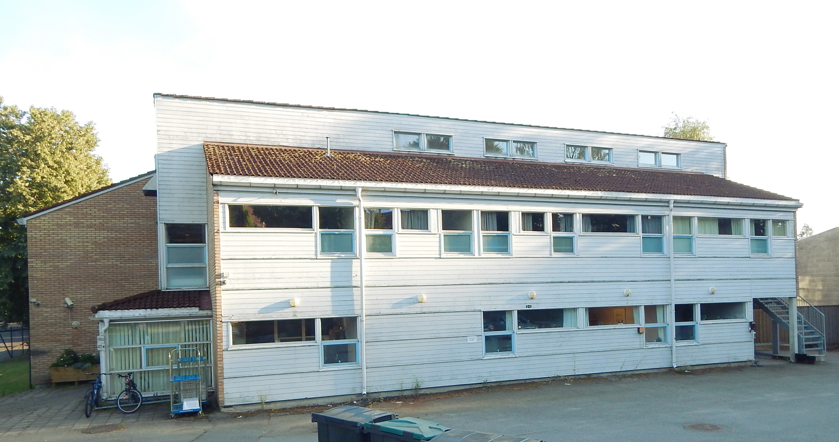 Barnevernets akutt- og utredningsinstitusjon i Jutulveien 17 i Oslo